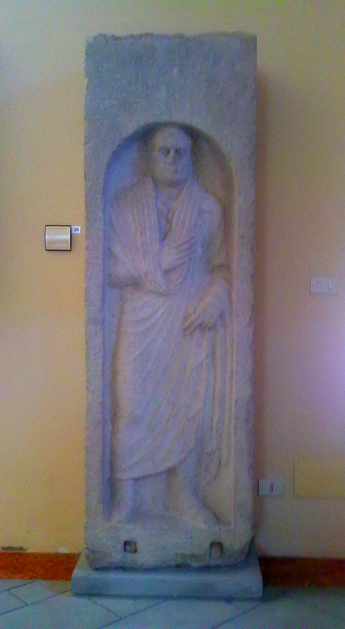 Stele del liberto Lucius Caesellius Diopanes, Museo Archeologico Nazionale di Sarsina